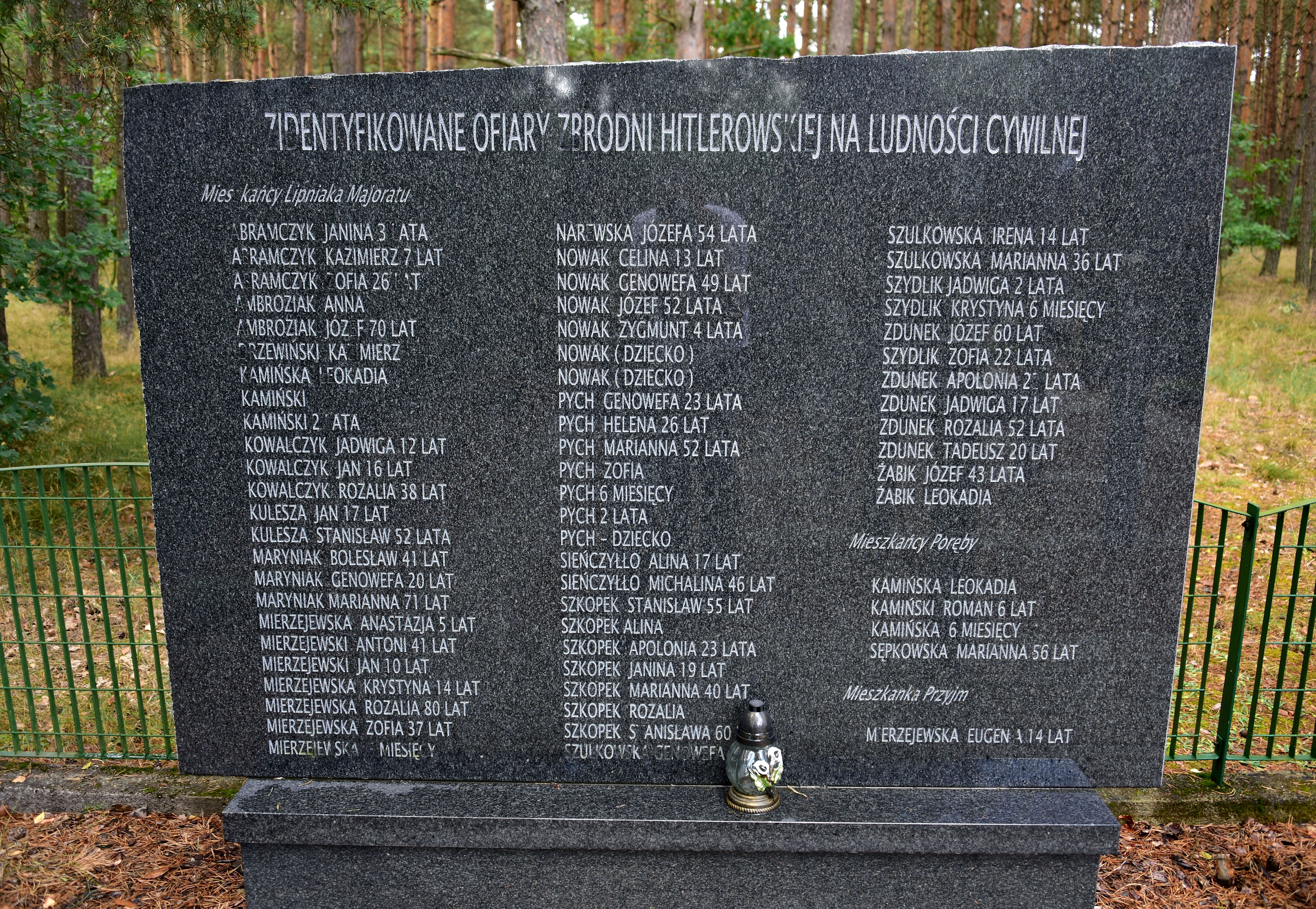 Upamiętnienie pacyfikacji wsi Lipniak-Majorat